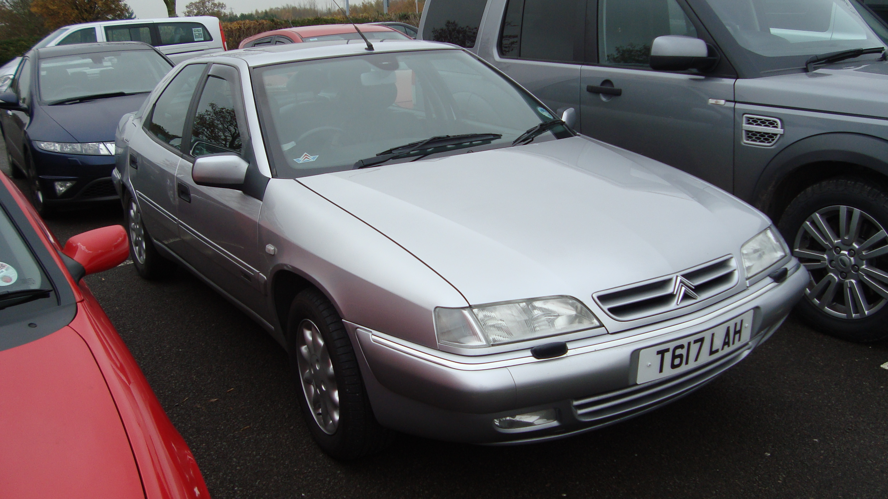 1999 Citroen Xantia 3.0 V6 Exclusive Auto